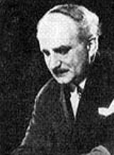 Farkas Imre magyar költő, operettíró, zeneszerző.